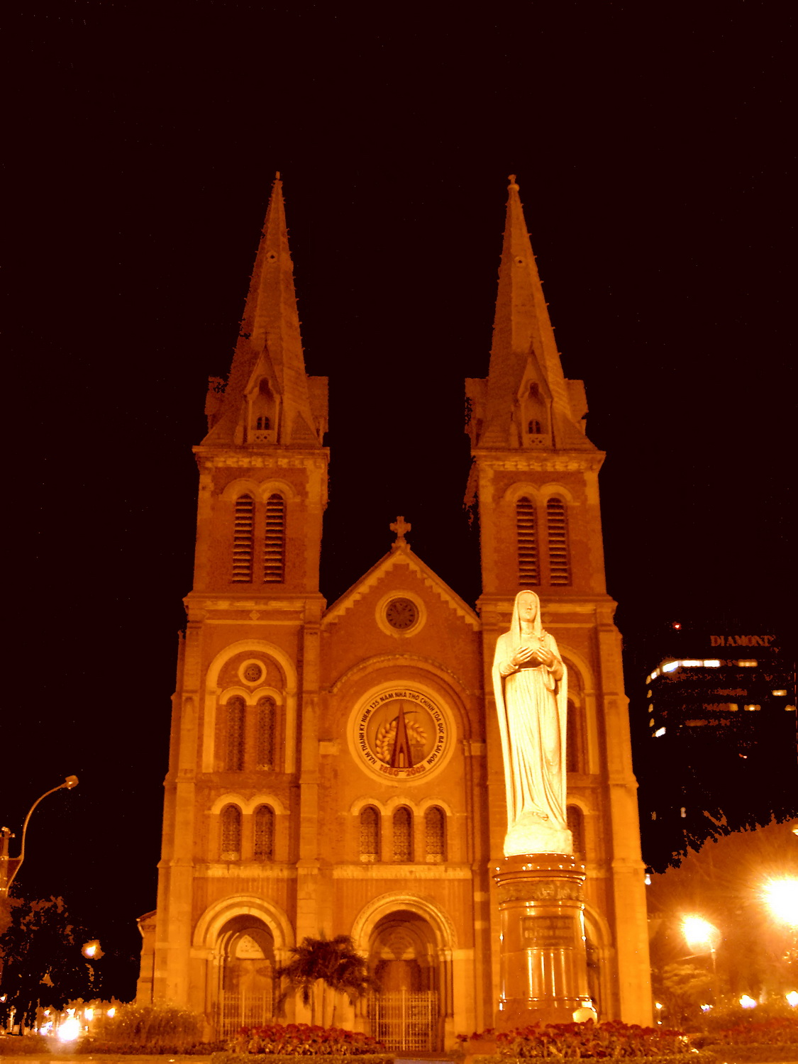 La Cathédrale Notre Dame